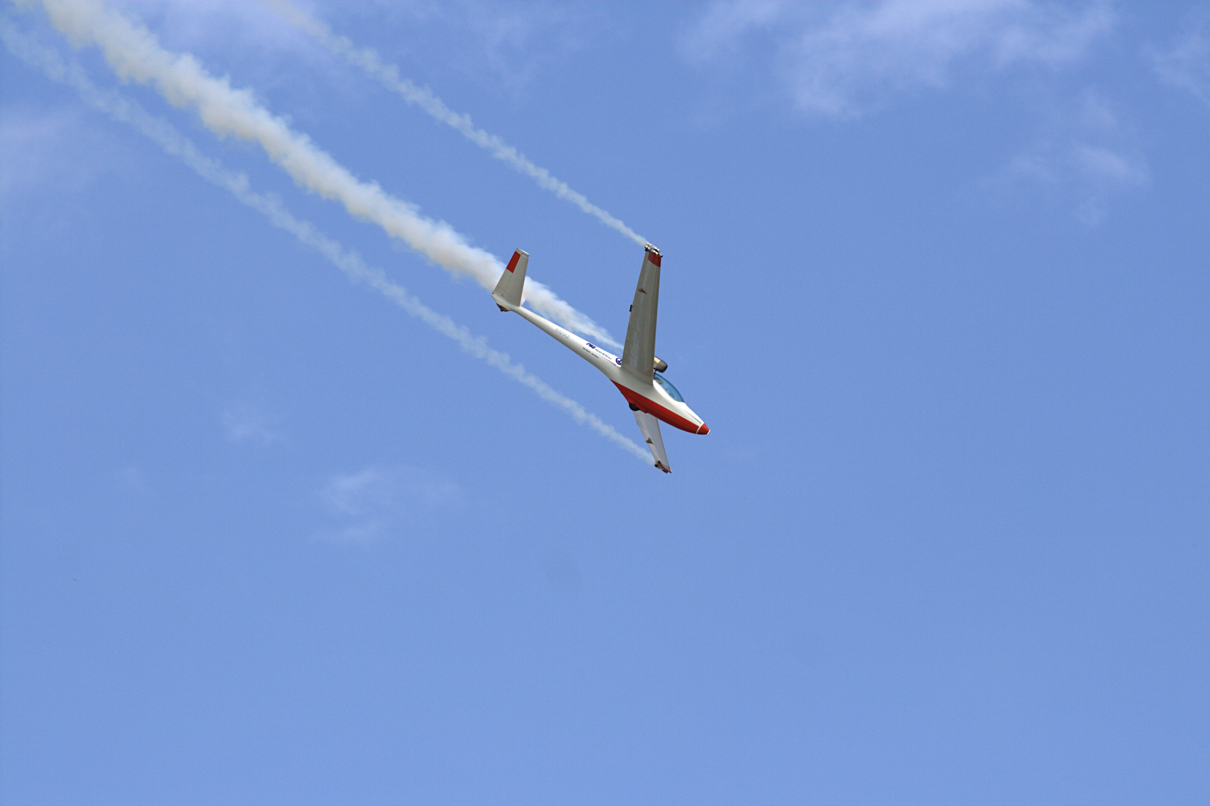 Jet Sailplane